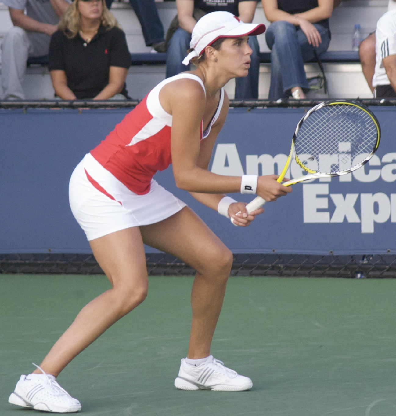 María José Martínez Sánchez at the 2009 US Open